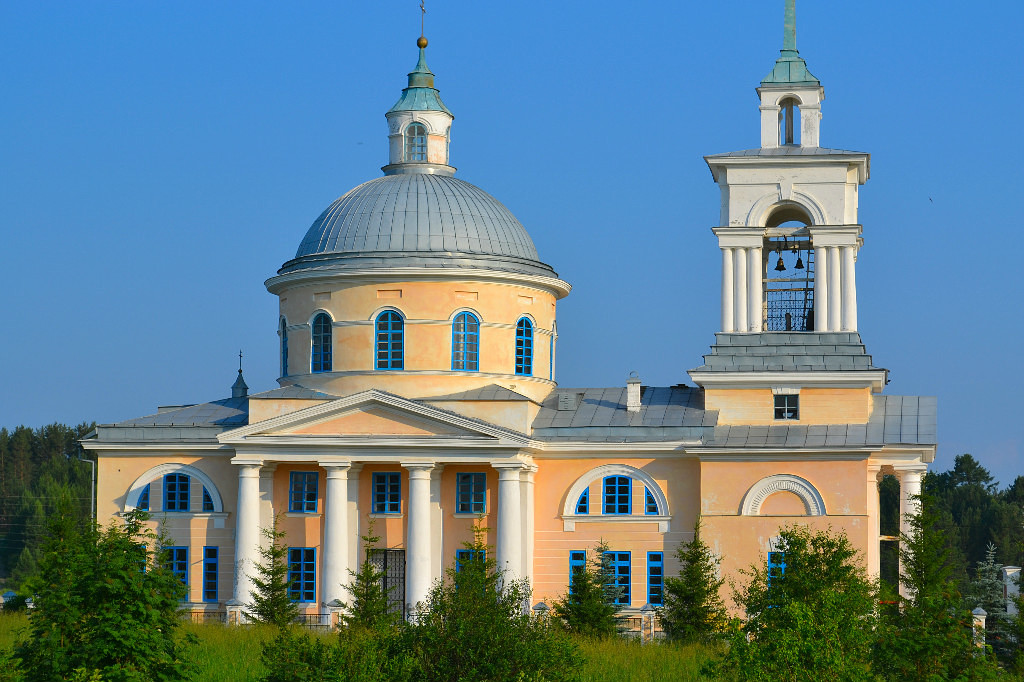 Церковь николая чудотворца (Свердловская область, Сухой Лог, село верх-поварня)